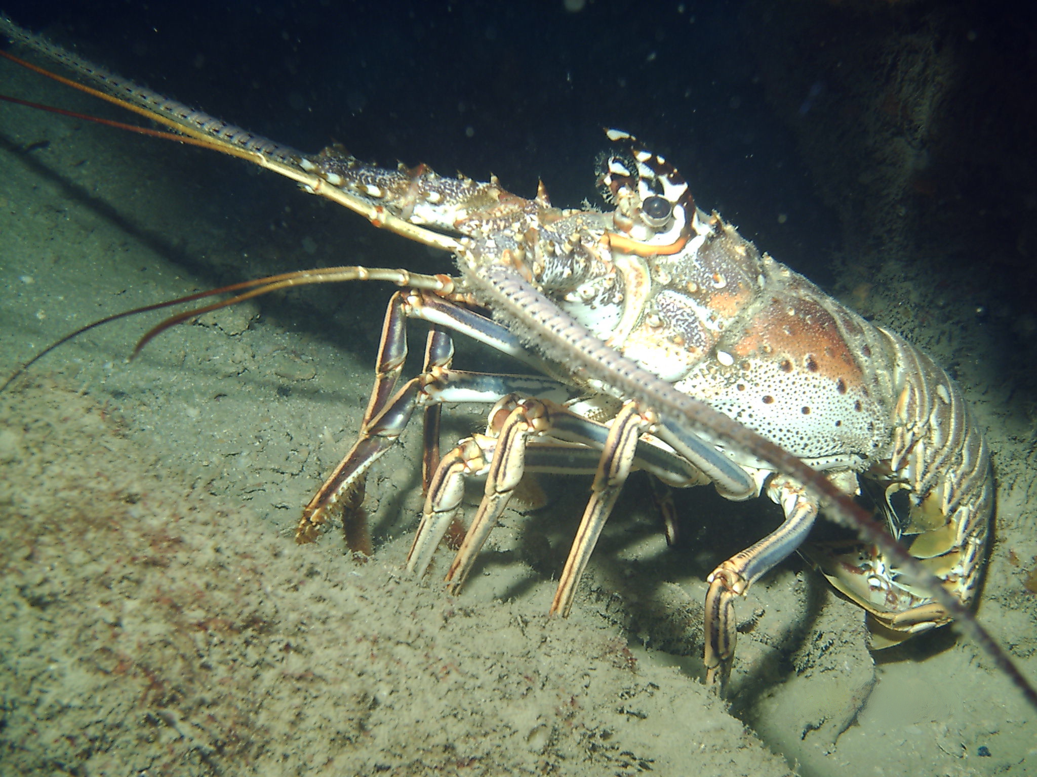 Langosta Espinosa, Panulirus argus. Jul-2004. Parque Nacional Morrocoy. Tucacas. Venezuela